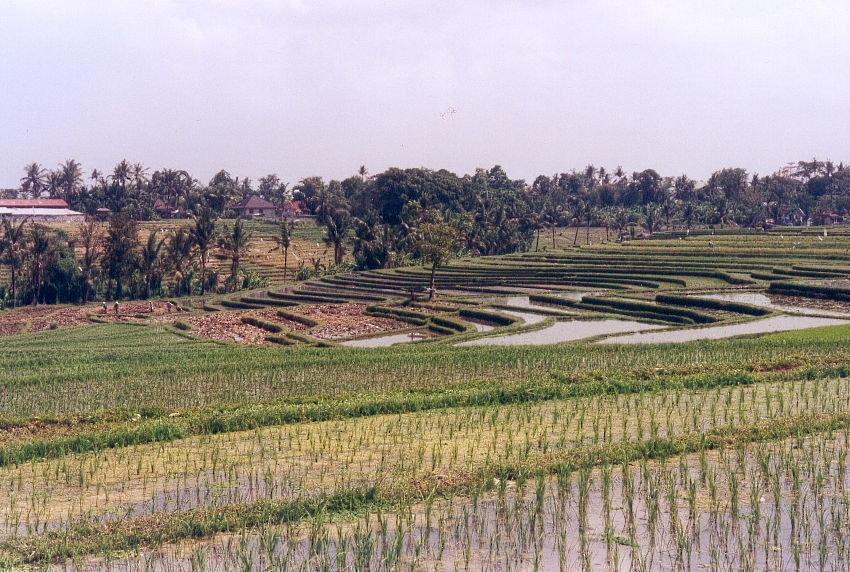 Auteur de la photographie : FC Georgio Lieu : BALI, INDONESIE Année : 1999